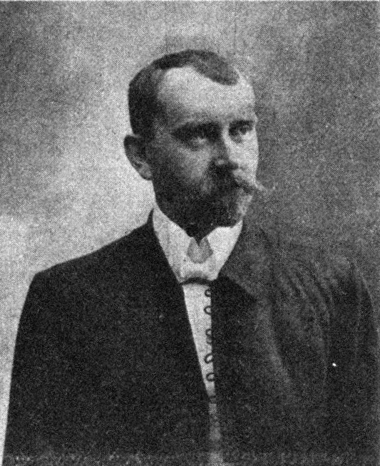 Österreichischer Politiker, Reichsratswahl 1907, Name siehe Dateiname